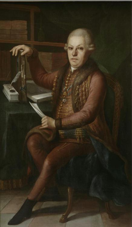 Niczky Kristóf magyar főispán, a Szent István rend tagja.